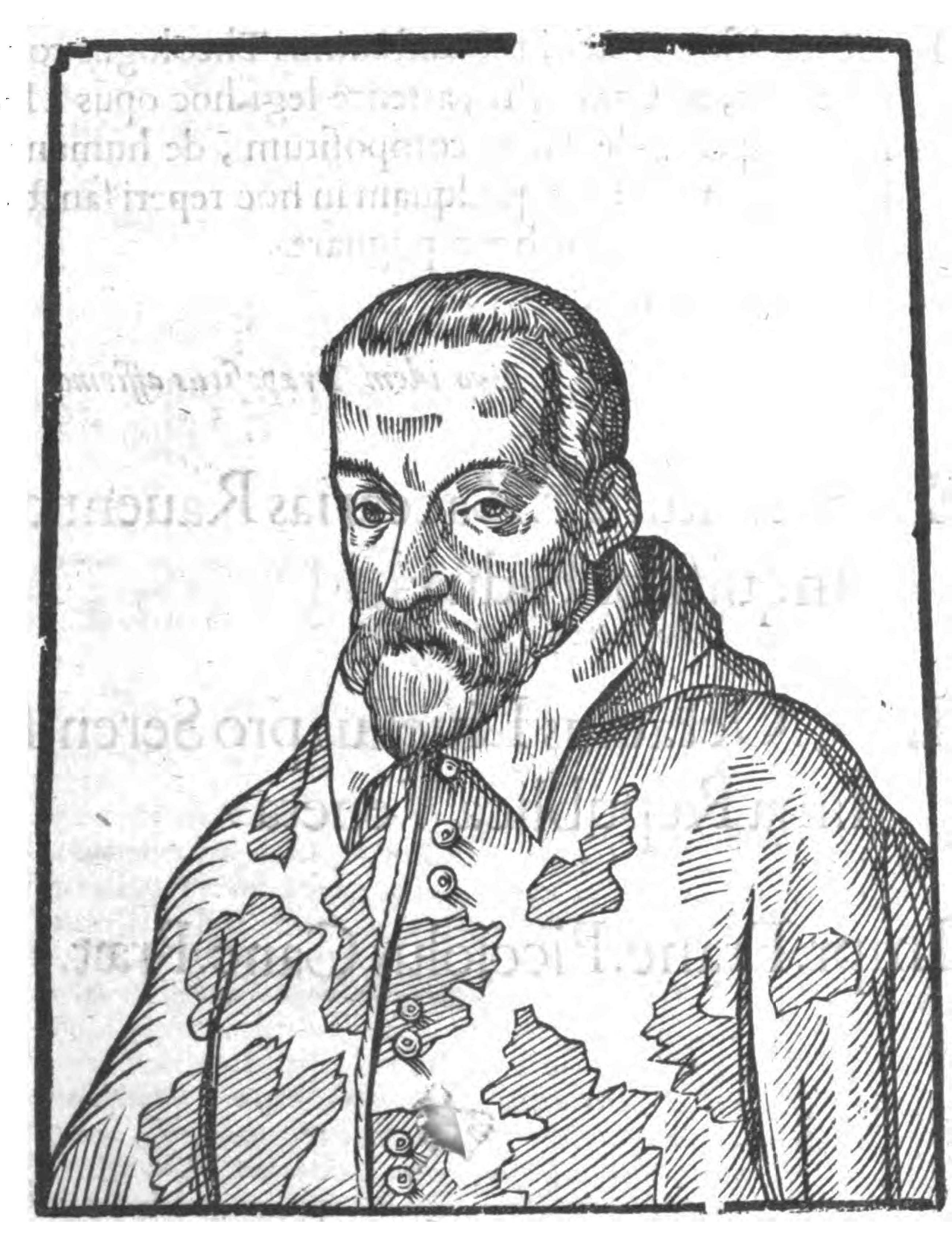 Il ritratto del cardinale Luigi d'Este.